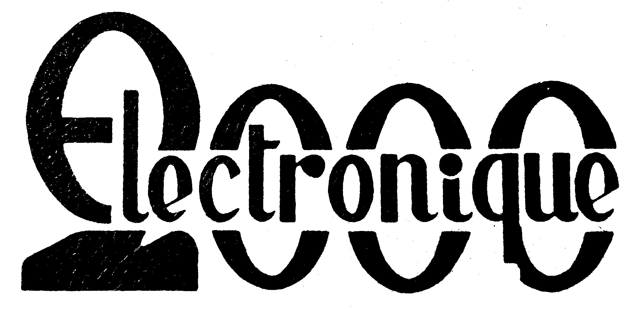 Logo Electronique 2000